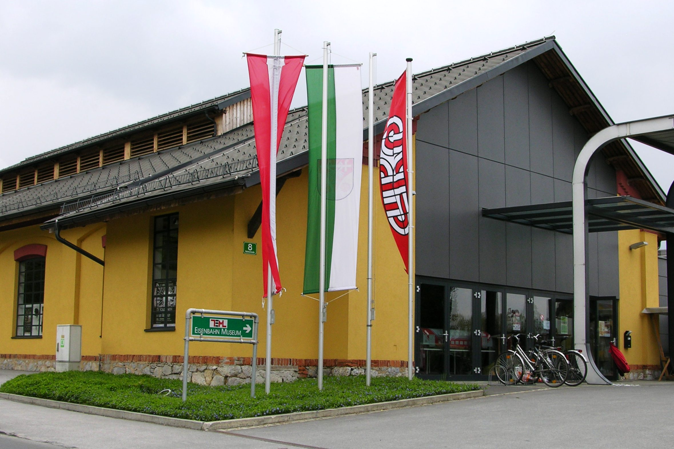 Teml in Lieboch am 1. Mai 2008